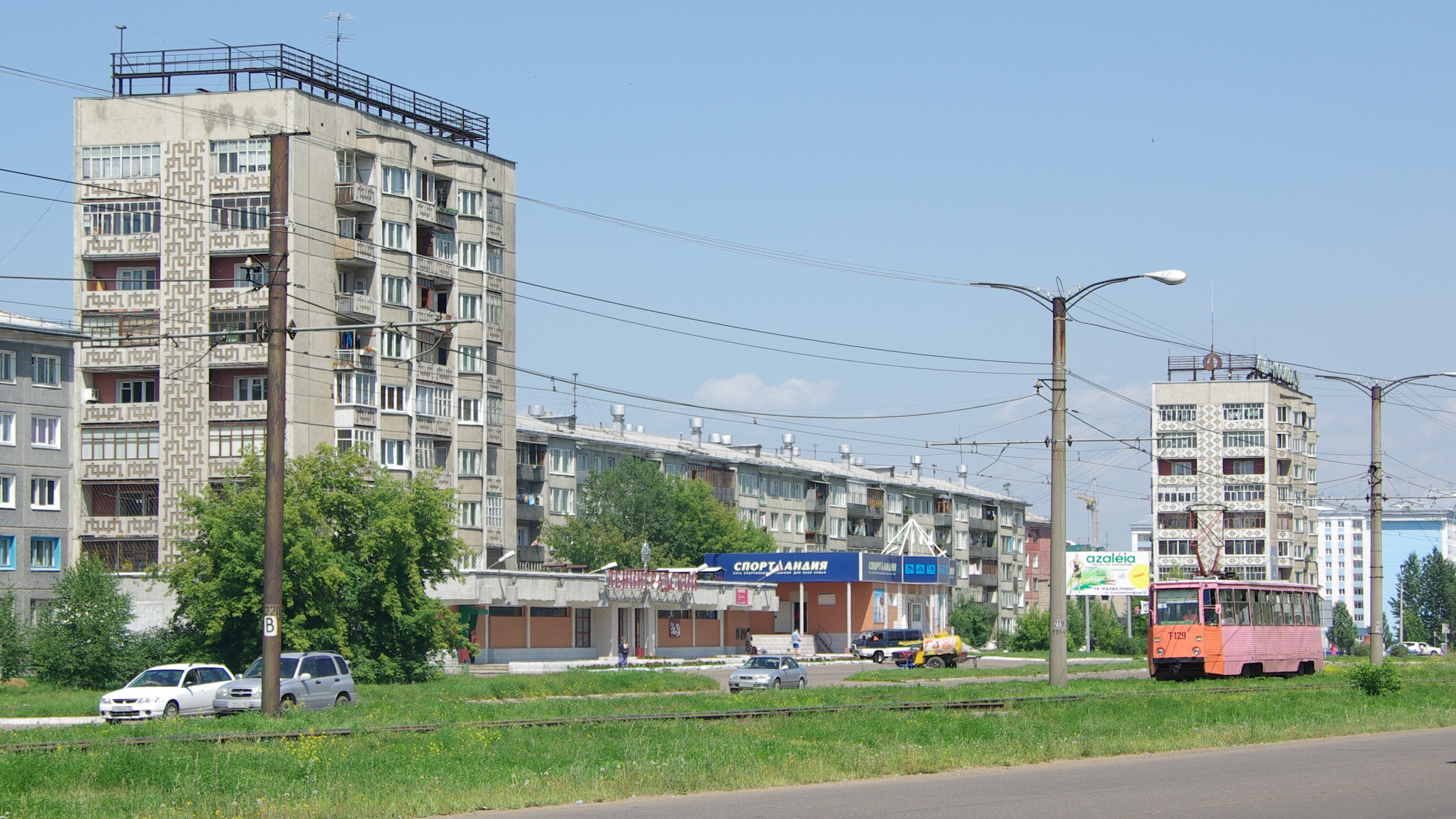 Ангарский трамвай 71-605 129